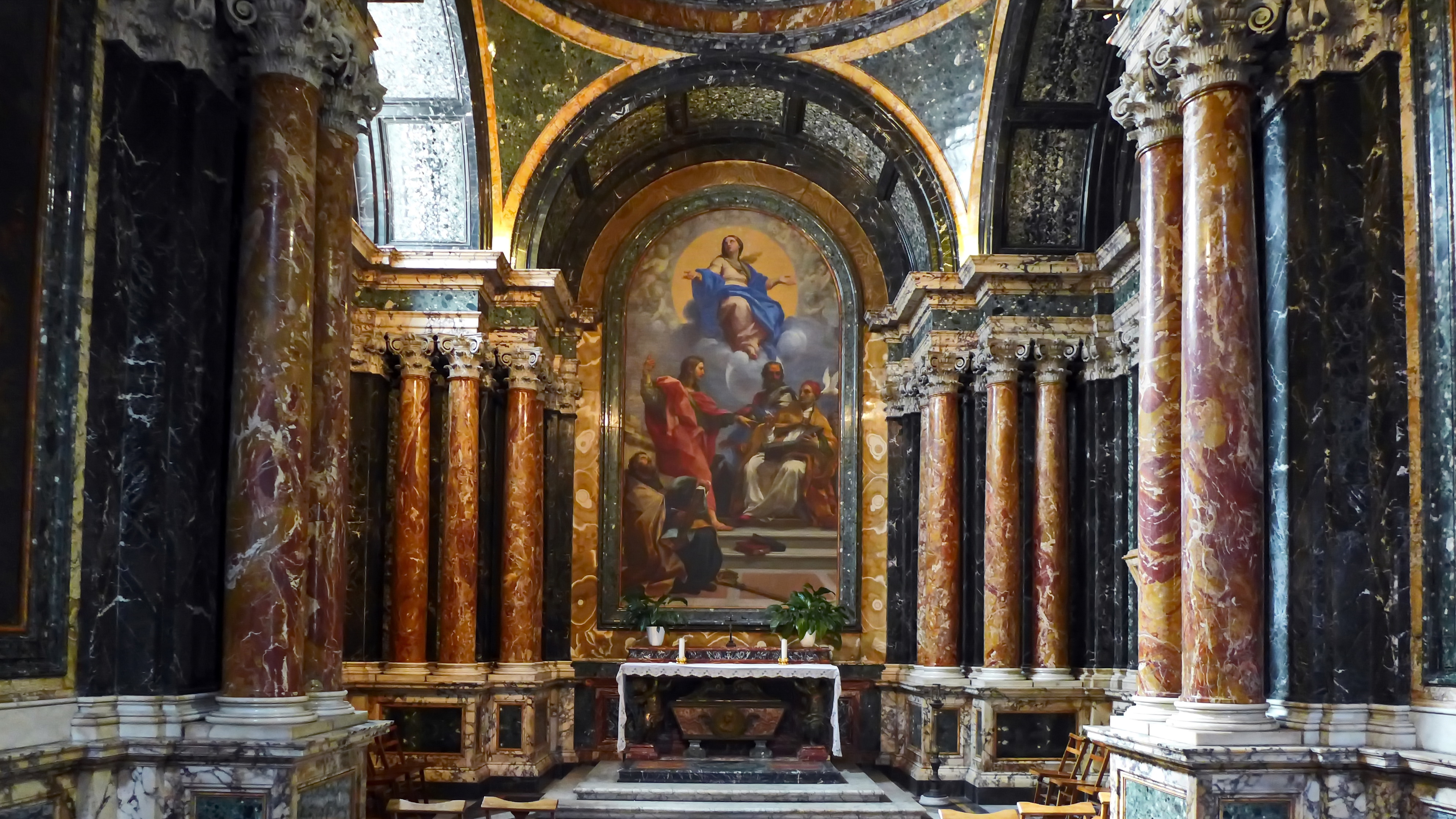 Santa Maria del Popolo Cappella Cybò